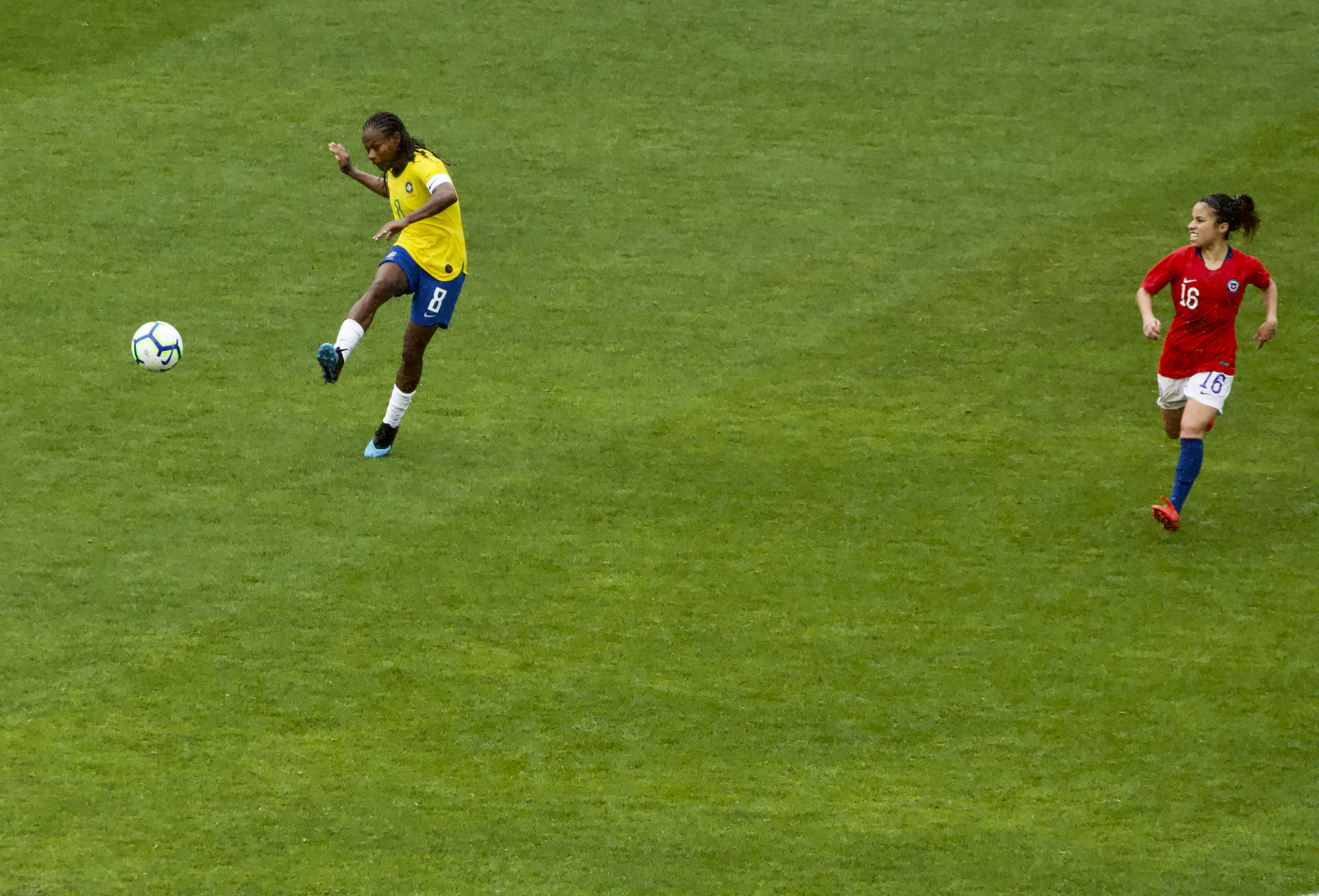 Formiga - tournoi international SP